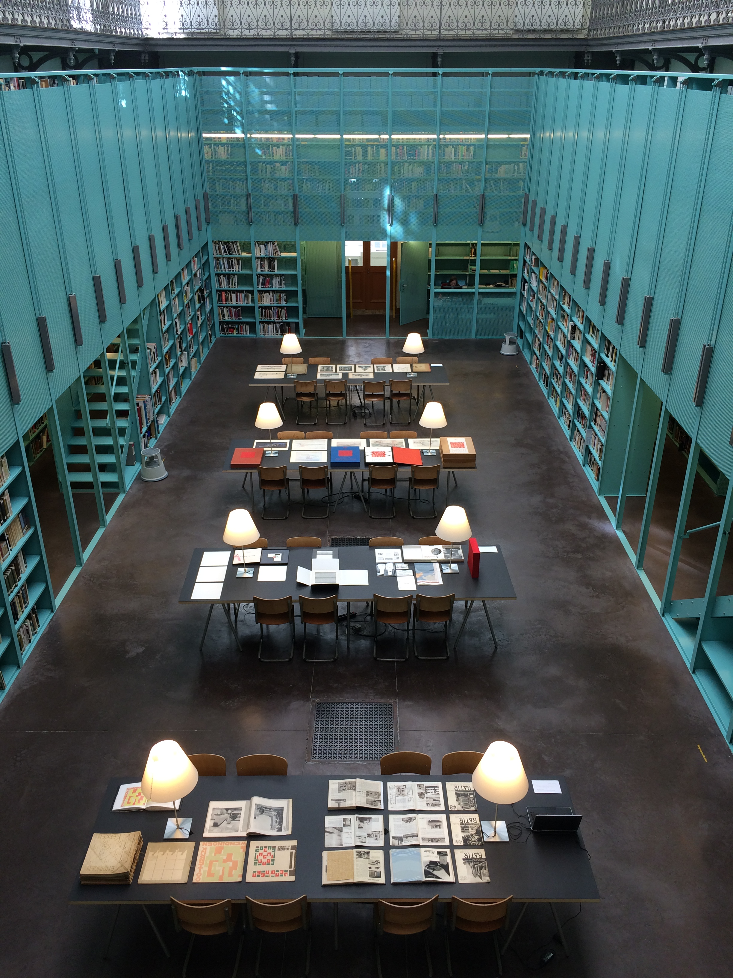 Tentoonstelling 8 oktober 2017 - 200 jaar UGent